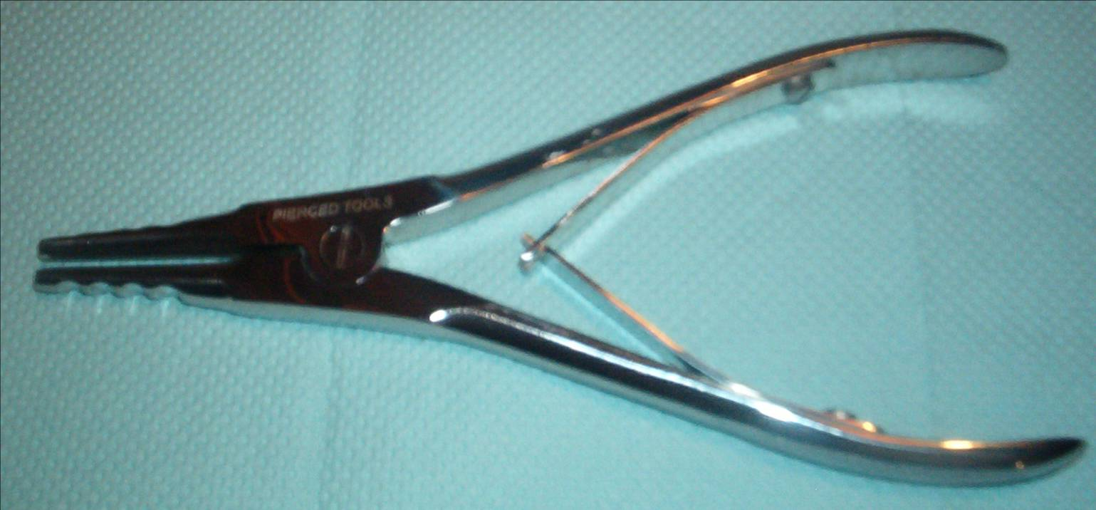 Ring opening pliers